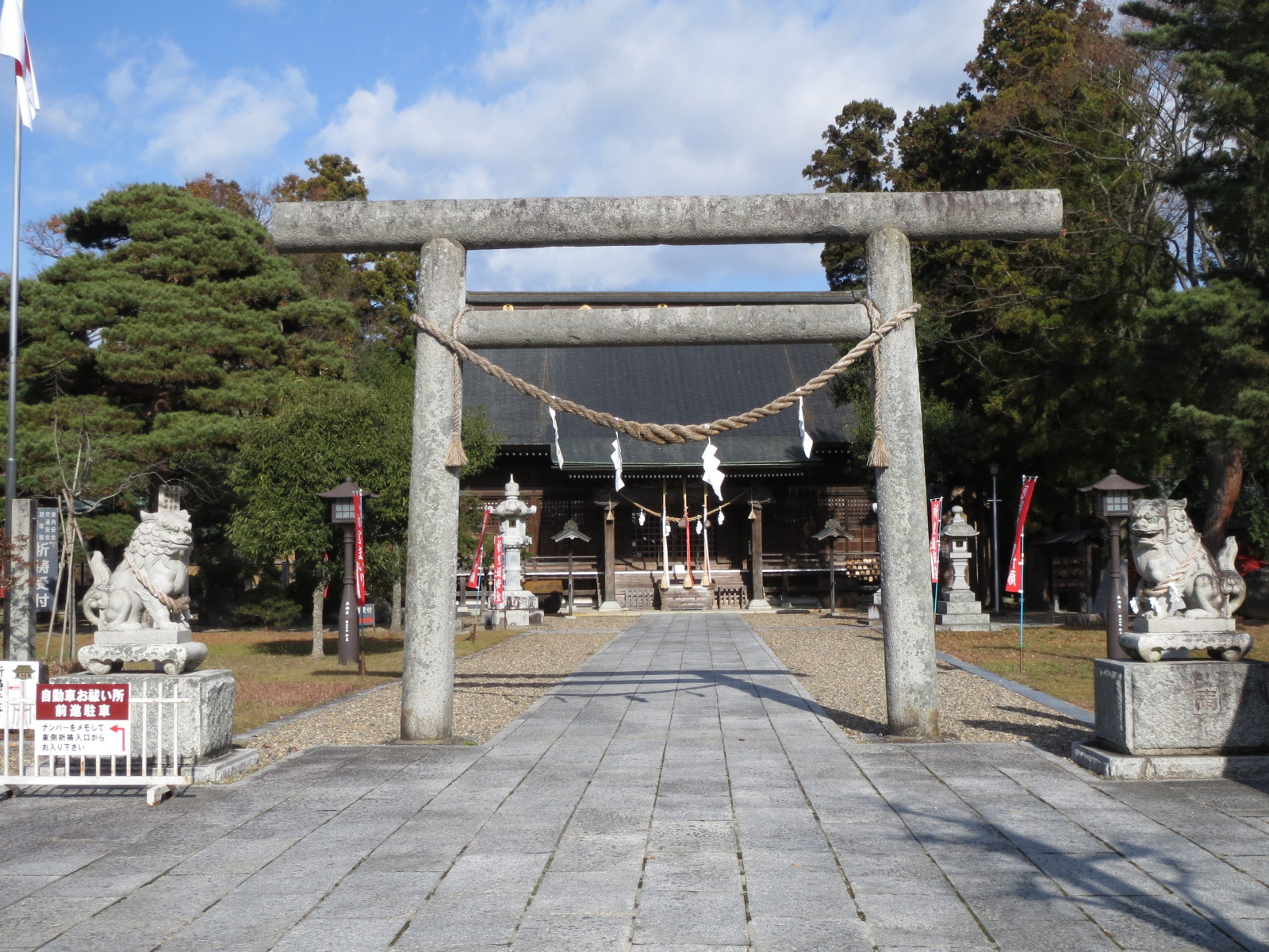 花巻市にある鳥谷ヶ崎神社鳥居 Canon IXY 3